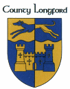 Longford megye címere